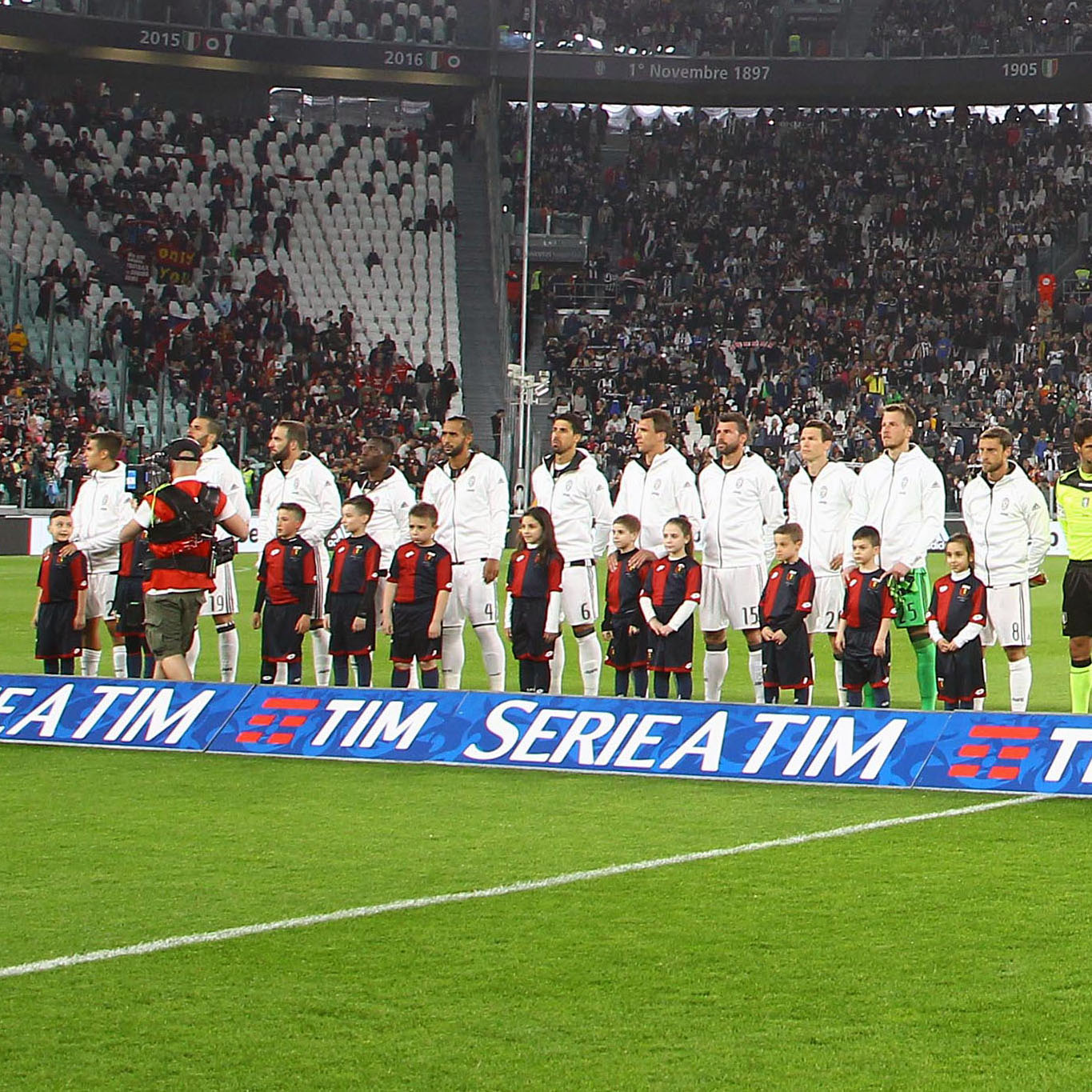 Torino, Juventus Stadium, 23 aprile 2017. La formazione della Juventus FC scesa in campo nella vittoriosa sfida contro il Genoa (4-0) valevole per la 33ª giornata del campionato italiano di Serie A 2016-17. Da sinistra: P. Dybala, L. Bonucci, G. Higuaín, K. Asamoah, M. Benatia, S. Khedira, M. Mandžukić, A. Barzagli, S. Lichtsteiner, Neto, C. Marchisio.